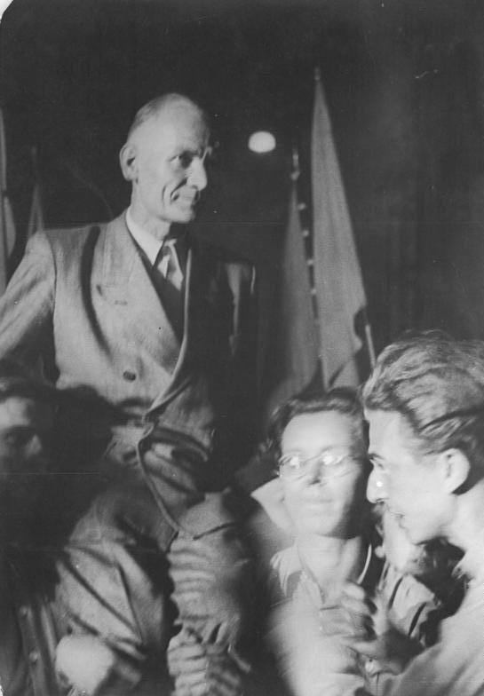 Zentralbild/Kemlein Gründung der Deutschen Demokratischen Republik am 7.10.1949. Anläßlich der Gründung der Deutschen Demokratischen Republik am 7.10.1949 und der Wahl des Staatspräsidenten Wilhelm Pieck am 11.10.1949 durch die Provisorische Länderkammer und die Provisorische Volkskammer, fand in den Abendstunden des 11. Oktober 1949 eine Massenkundgebung auf dem August-Bebel-Platz in Berlin statt. UBz: Begeisterte Jugendliche tragen den Aktivisten Adolf Hennecke auf ihren Schultern im Demonstrationszug. 4157-49